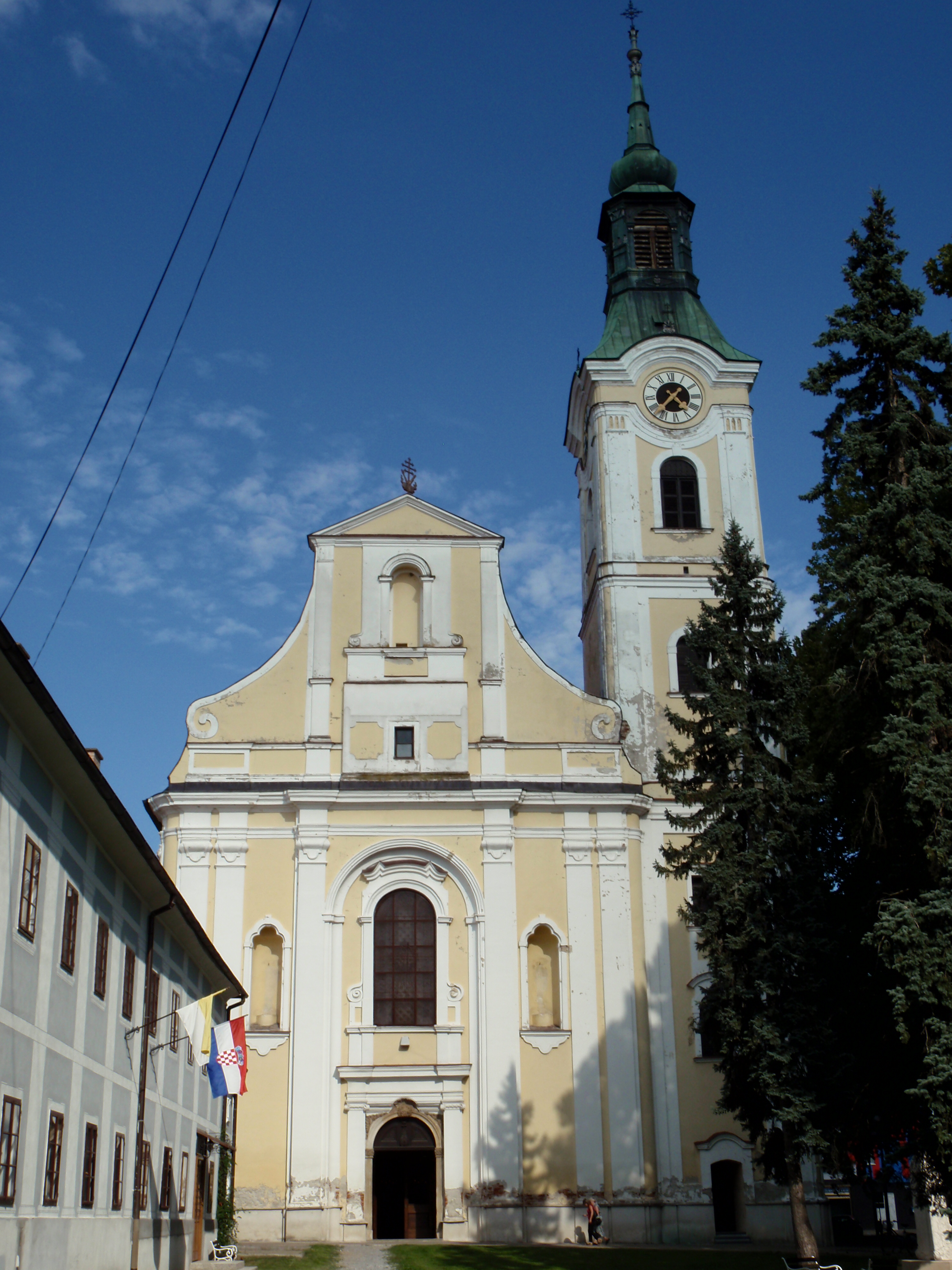 Crkva Sv. Roka u Virovitici